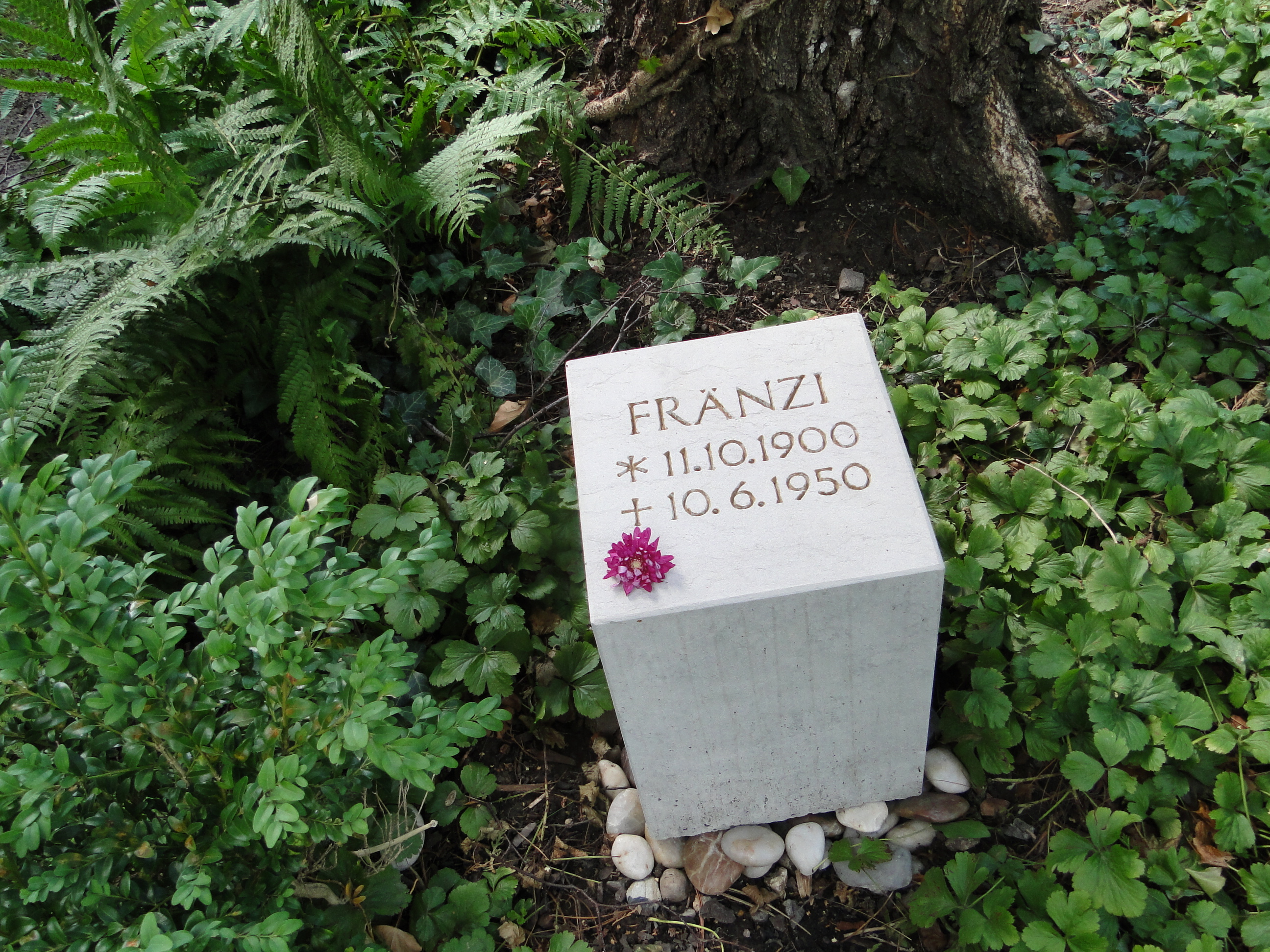 Gedenkstein für Lina Franziska „Fränzi“ Fehrmann, Muse und Modell der Brücke-Künstler, auf dem Äußeren Brisnitzer Friedhof in Dresden, am 15. Juni 2011 eingeweiht